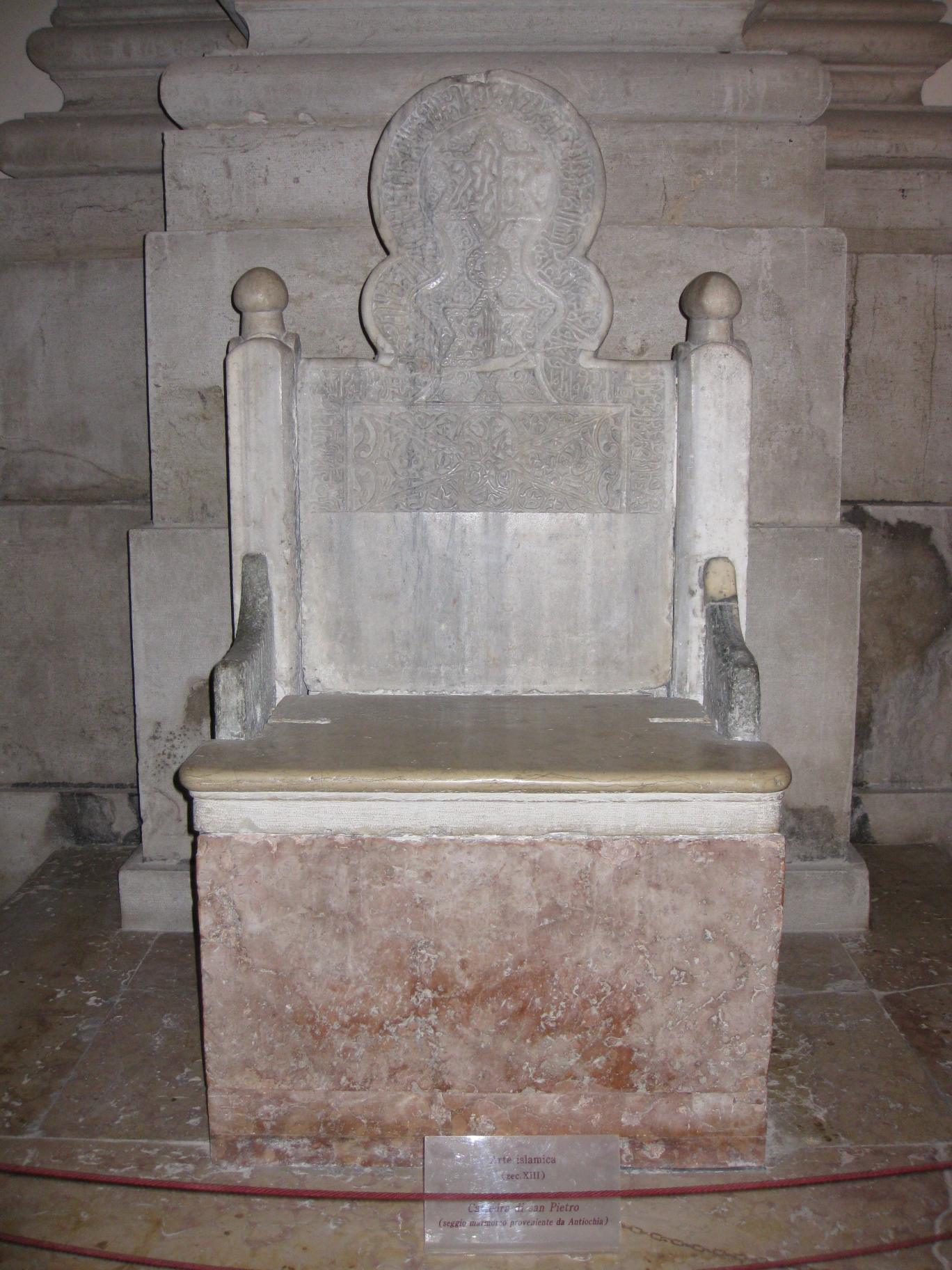 Chiesa di San Pietro di Castello a Venezia - Cattedra di San Pietro